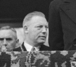 Collectie / Archief : Fotocollectie Anefo Reportage / Serie : [ onbekend ] Beschrijving : Serie: Bezoek van koningin Juliana en prins Bernhard aan Friesland Datum : 26 september 1950 Locatie : Friesland Trefwoorden : bezoeken, koninklijk huis Persoonsnaam : Bernhard, prins, Juliana, koningin Fotograaf : Noske, J.D. / Anefo Auteursrechthebbende : Nationaal Archief Materiaalsoort : Glasnegatief Nummer archiefinventaris : bekijk toegang 2.24.01.09 Bestanddeelnummer : 904-2127